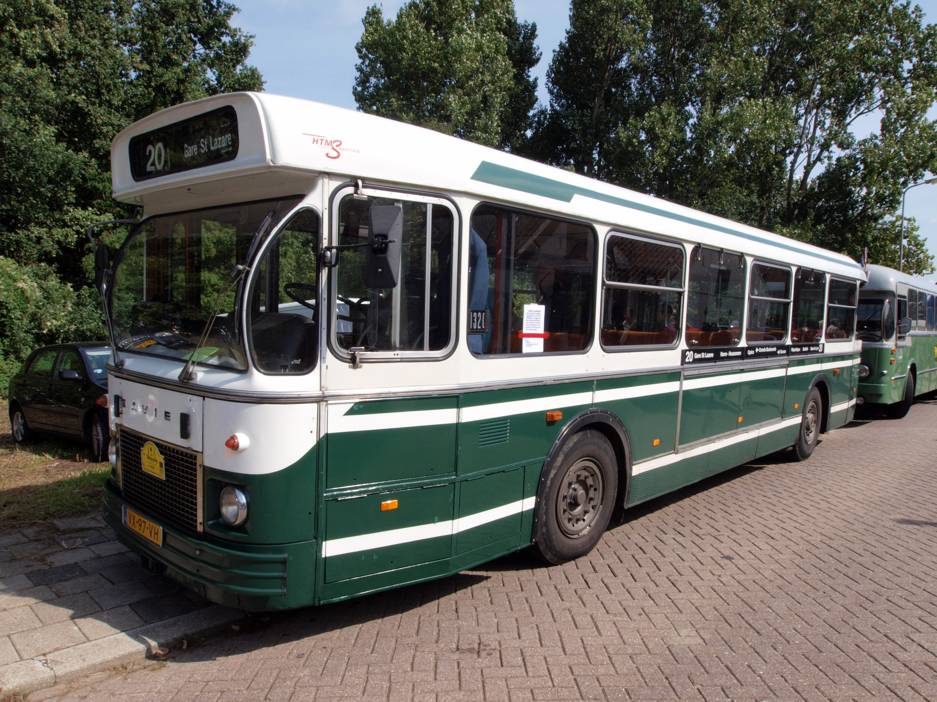 1977 Saviem SC10U